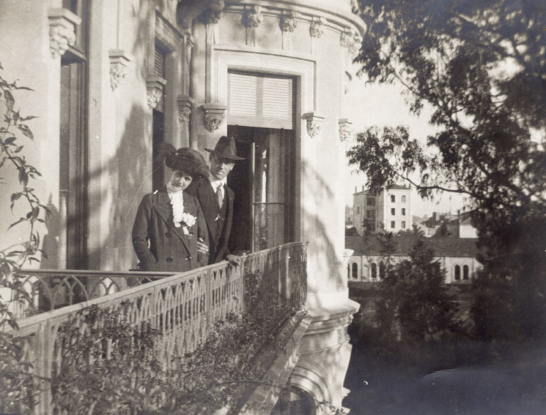 Великий князь Михаил Александрович с морганатической супругой Н. М. Брасовой